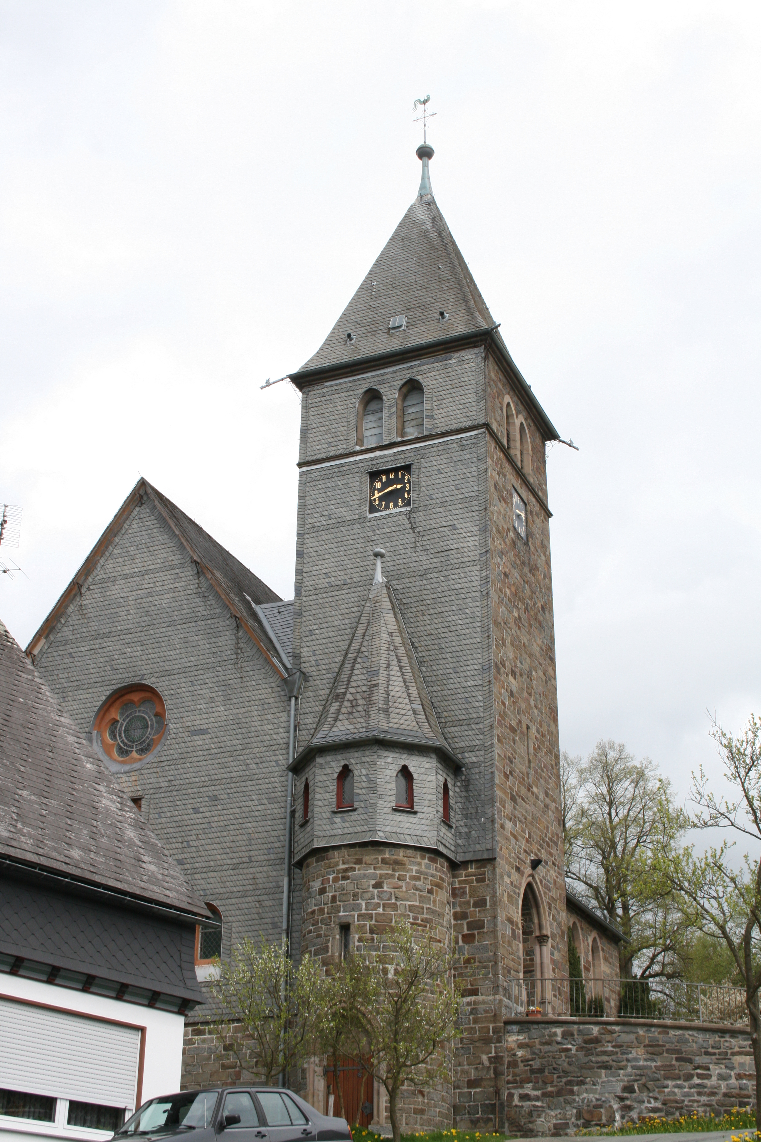 Kirche in Birkelbach im Mai 2013